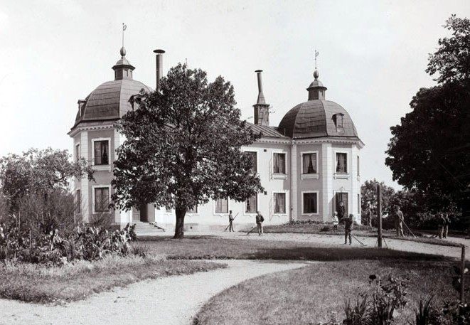 Södermannagatan 49, Stora Blecktornet. Parti mot öster